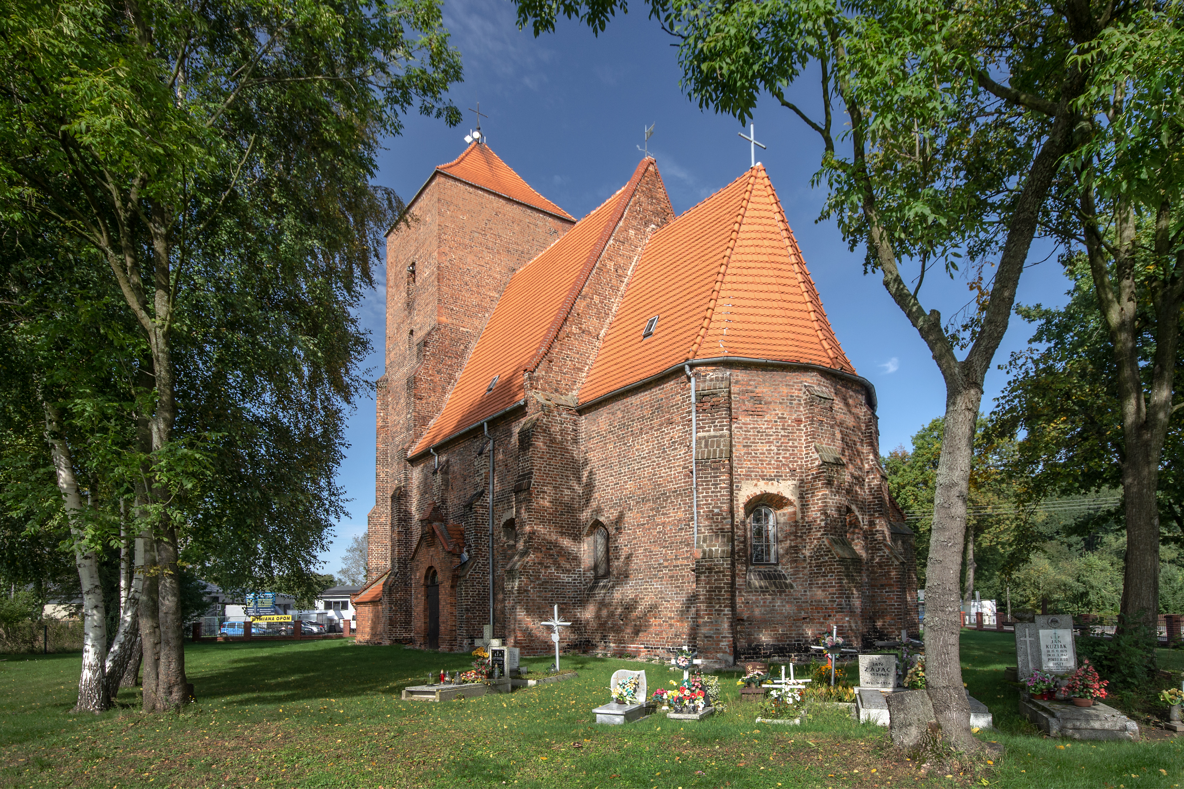 Domaszczyn, kościół fil. p.w. Podwyższenia Krzyża Św., 1565, 1859